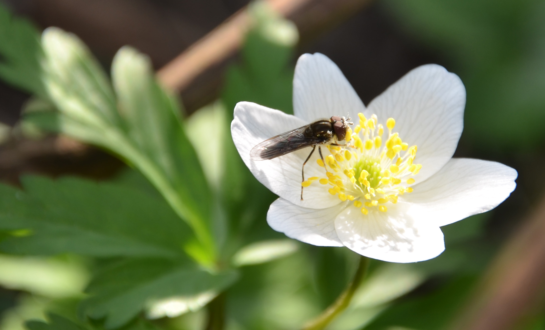 Anémone sylvie (Anemone nemorosa), pollinisation par un insecte non identifiée (aide bienvenue). Nord de la France, 2012-03-24